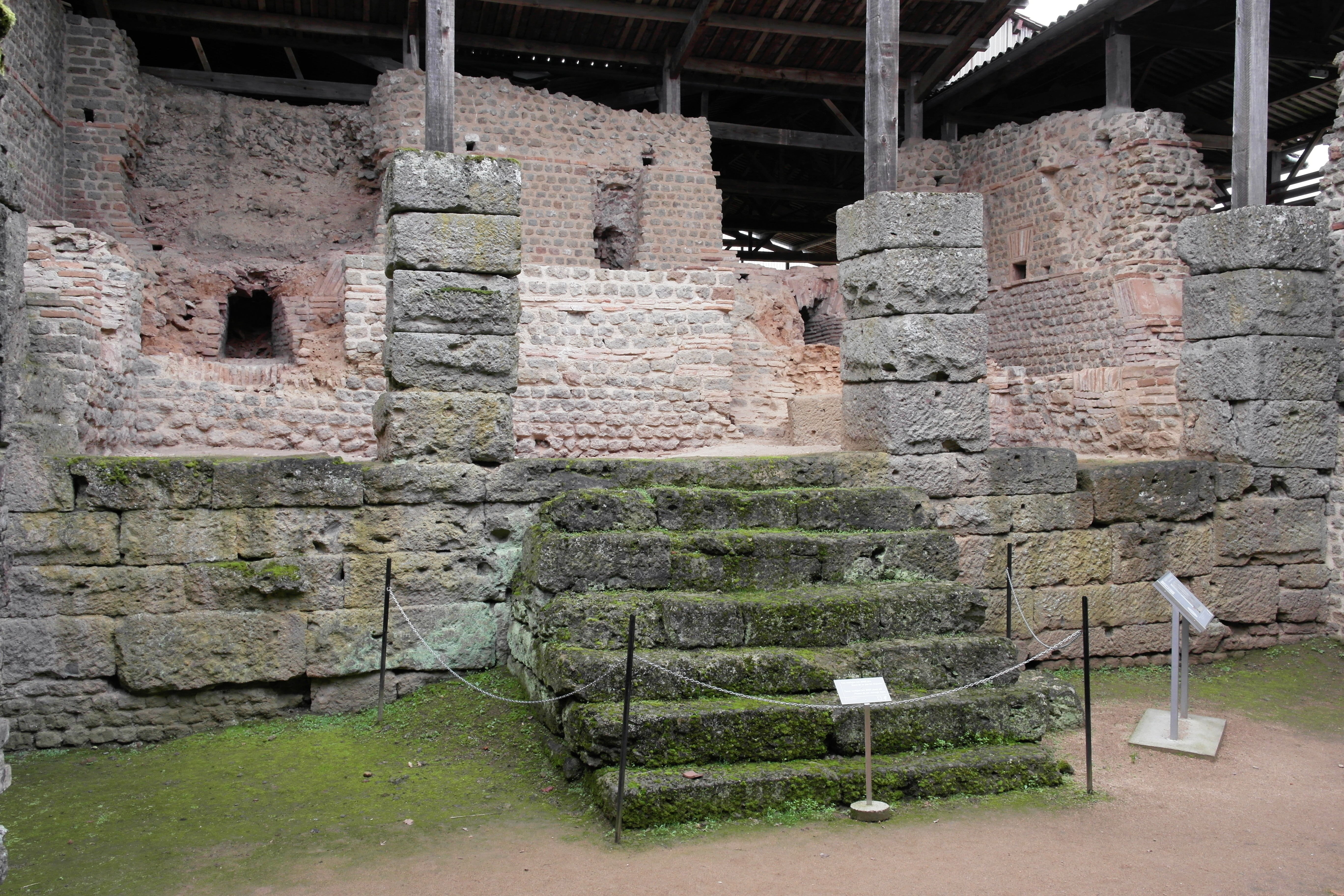 Cassinomagus, commune de Chassenon, Charente, France S-O. Thermes classés MH. .